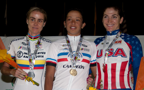 El podio del omnium femenino Campeonato Panamericano de Ciclismo de Pista, Medellín. 5 de mayo de 2011.